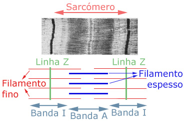 Esquema de um sarcómero, a unidade contráctil do músculo esquelético. Versão com legendas em Português, editada a partir do original em Image:Sarcomere.gif